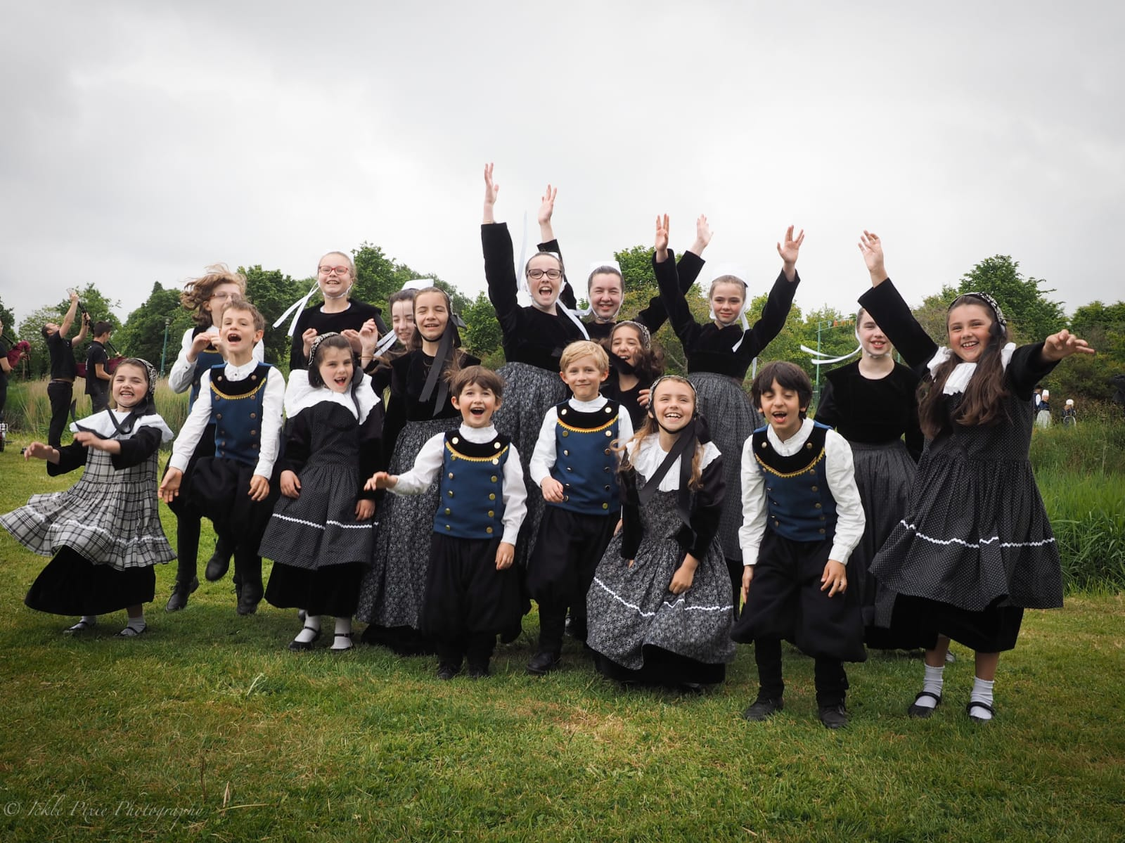 Photo du groupe enfant lors de la fête Gouel Ar Vugale 2019 à Pont l'Abbé. Photo Ickle Pixie Photography